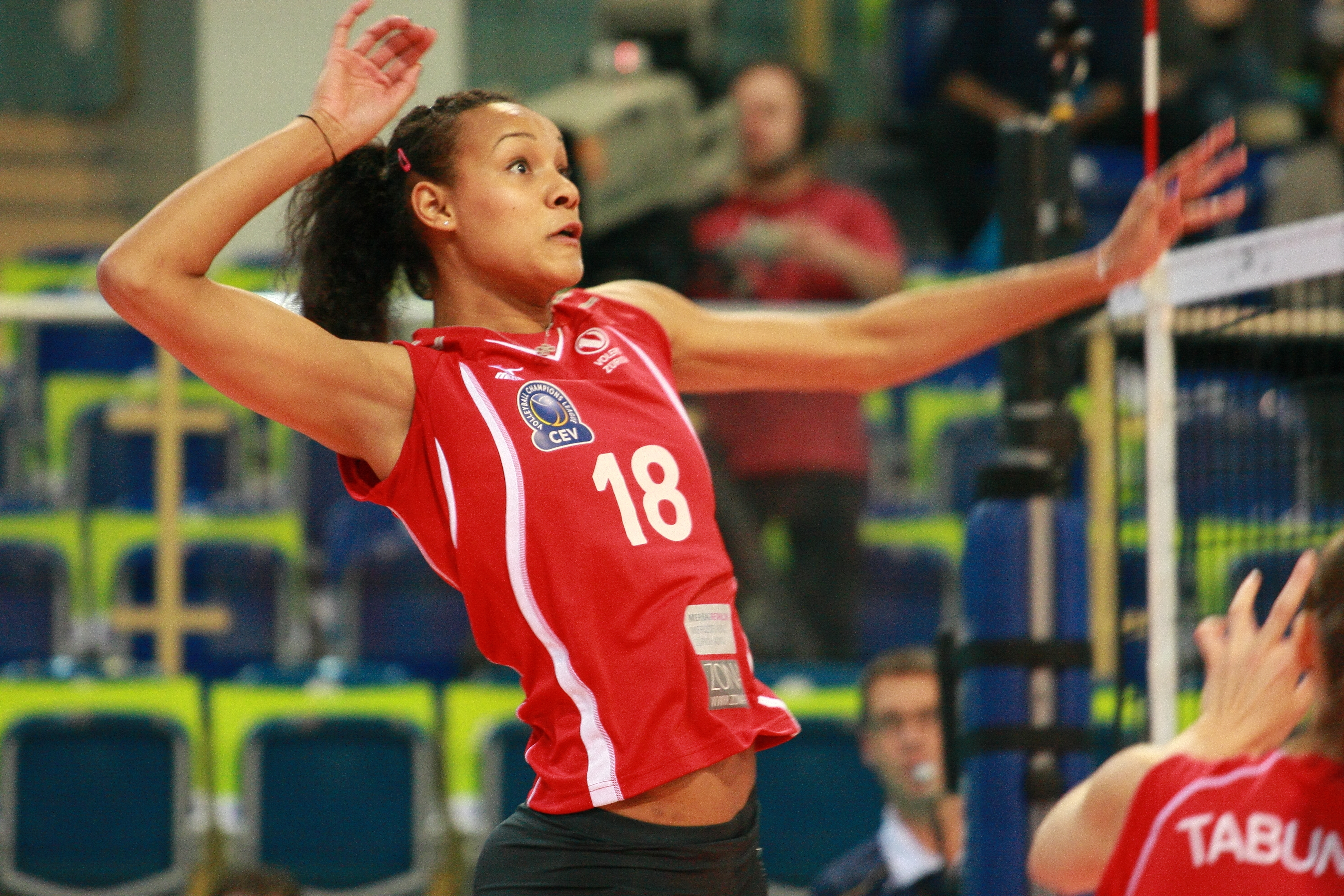 Atom Trefl Sopot vs Volero Zurich